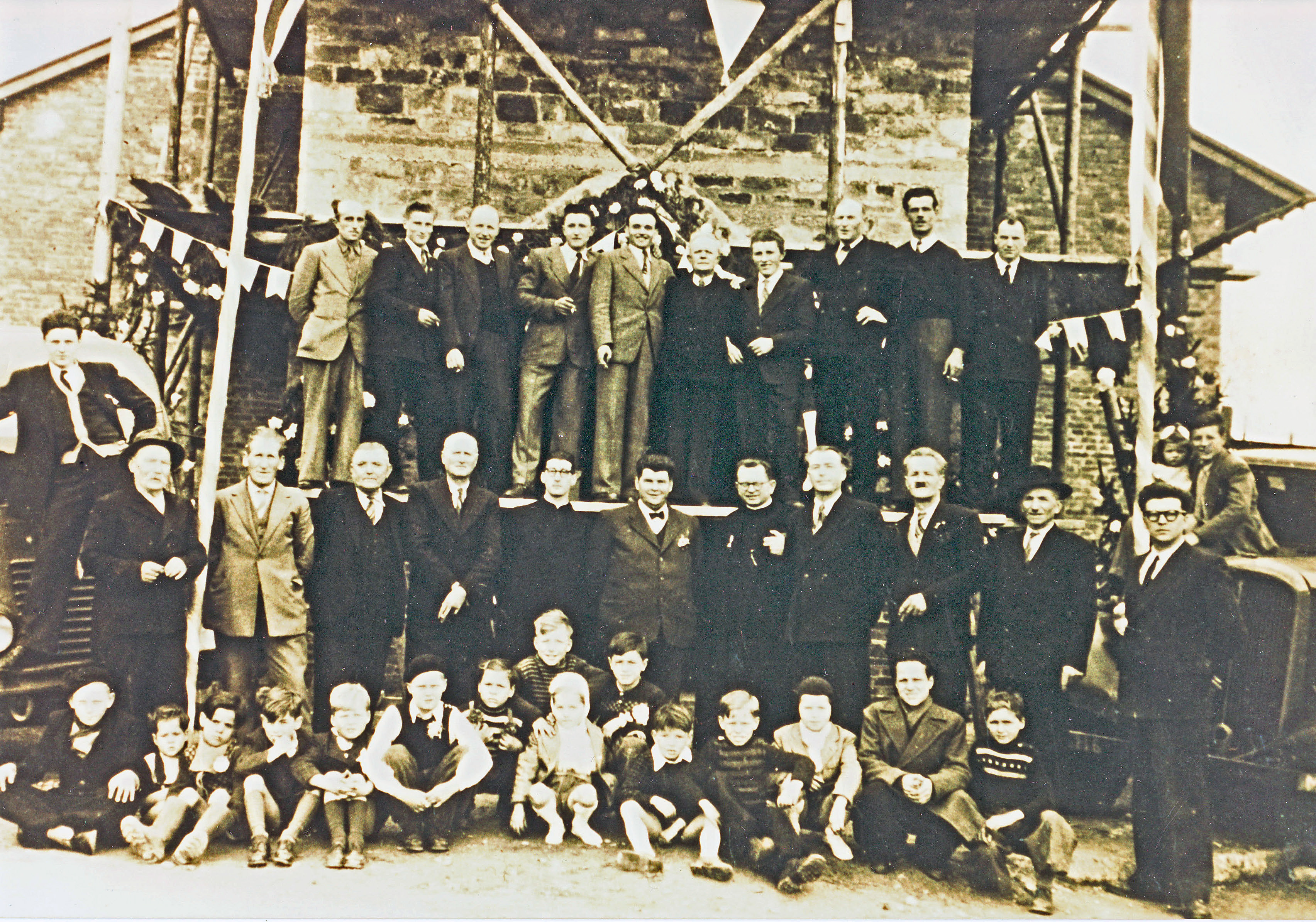 L'Hôpital (Moselle), photo prise lors de l'inauguration de l'église de la Cité Colline en 1952 avec les constructeurs et bâtisseurs (maçons italiens) et le député Jean-Pierre Sauder ainsi que le curé Charles Krummenacker.